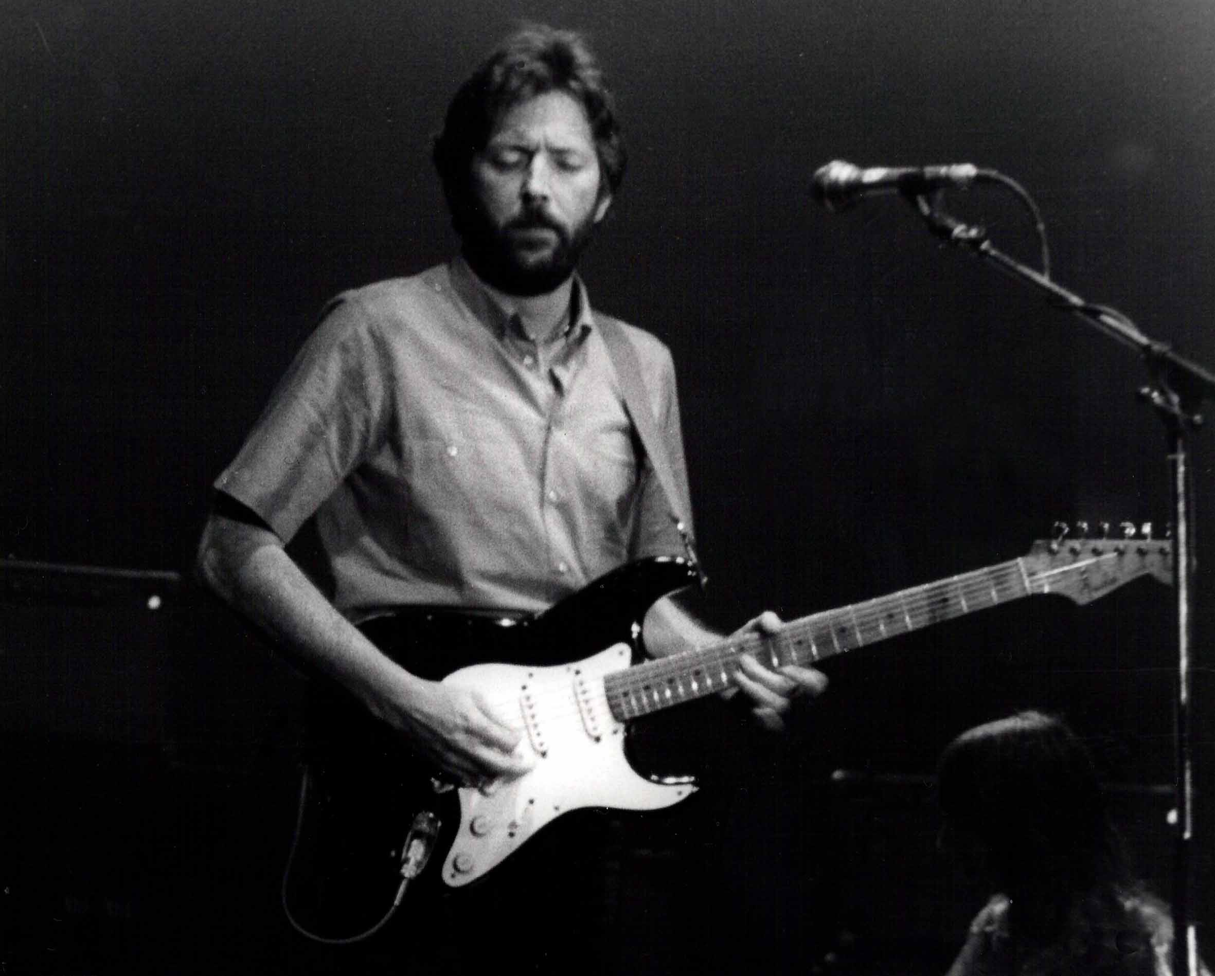 Qué decir!!. Simplemente un genio. (Va por ti Elegua1974). Camara: Olympus OM2 Objetivo: OM 135mm 2.8 Photographer: F. Antolín Hernandez